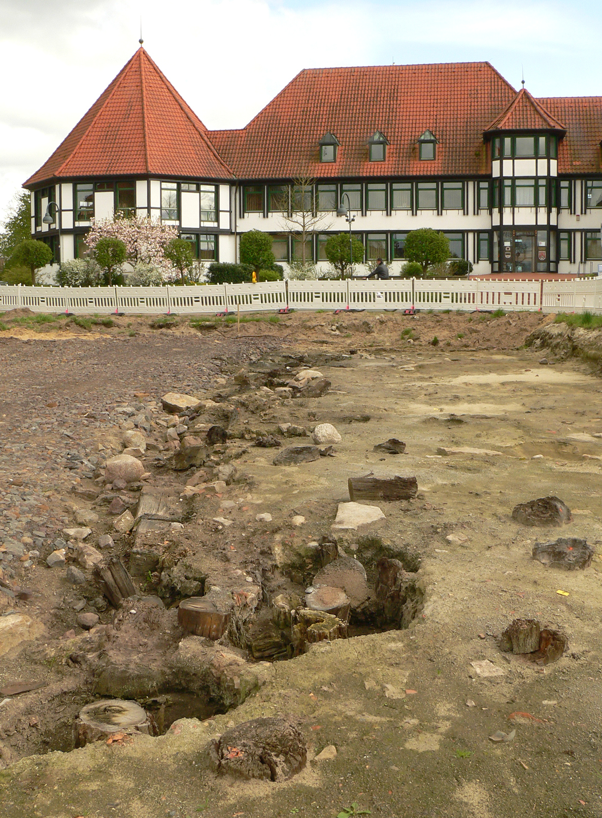 Grabungsareal gegenüber der früheren Burganlage mit Holzpfählen im Boden